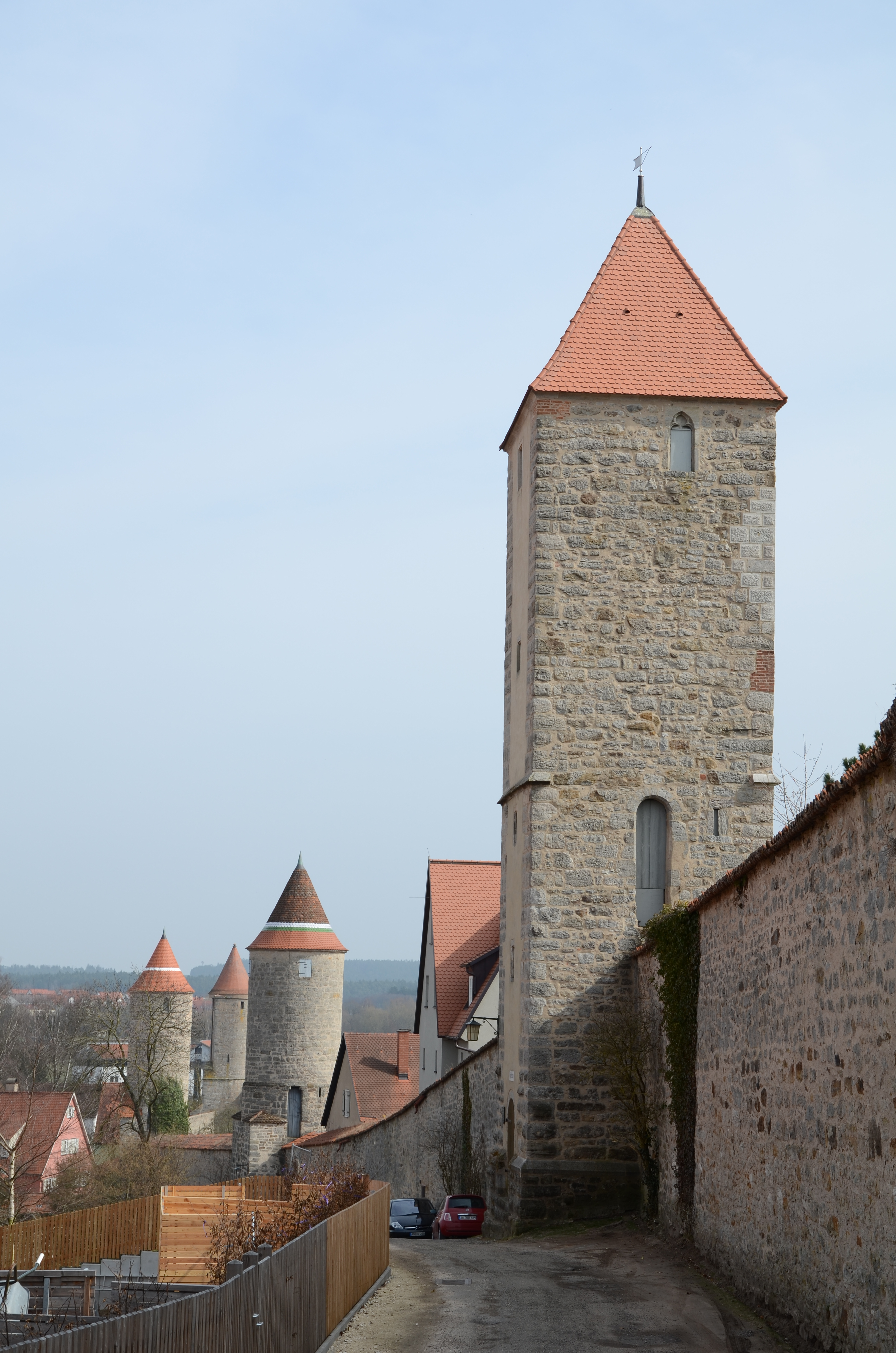 Baudenkmal in Dinkelsbühl: Adresse siehe Dateiname